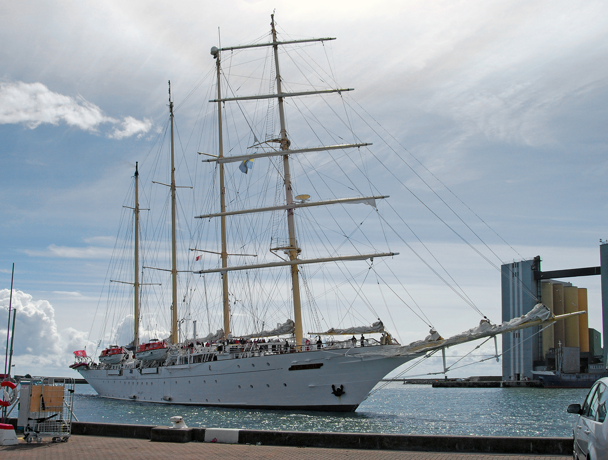 Star Flyer - Ystad 2013